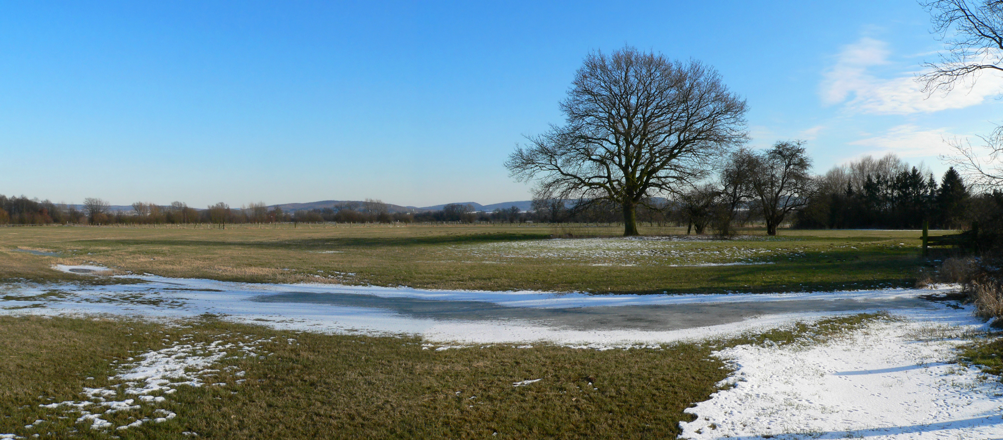 Burghügel von Hus Aren in Höhe der Baumgruppe